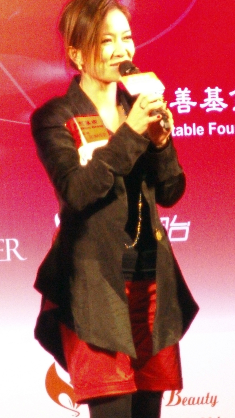 中文（香港）: 顏培珊的樣子